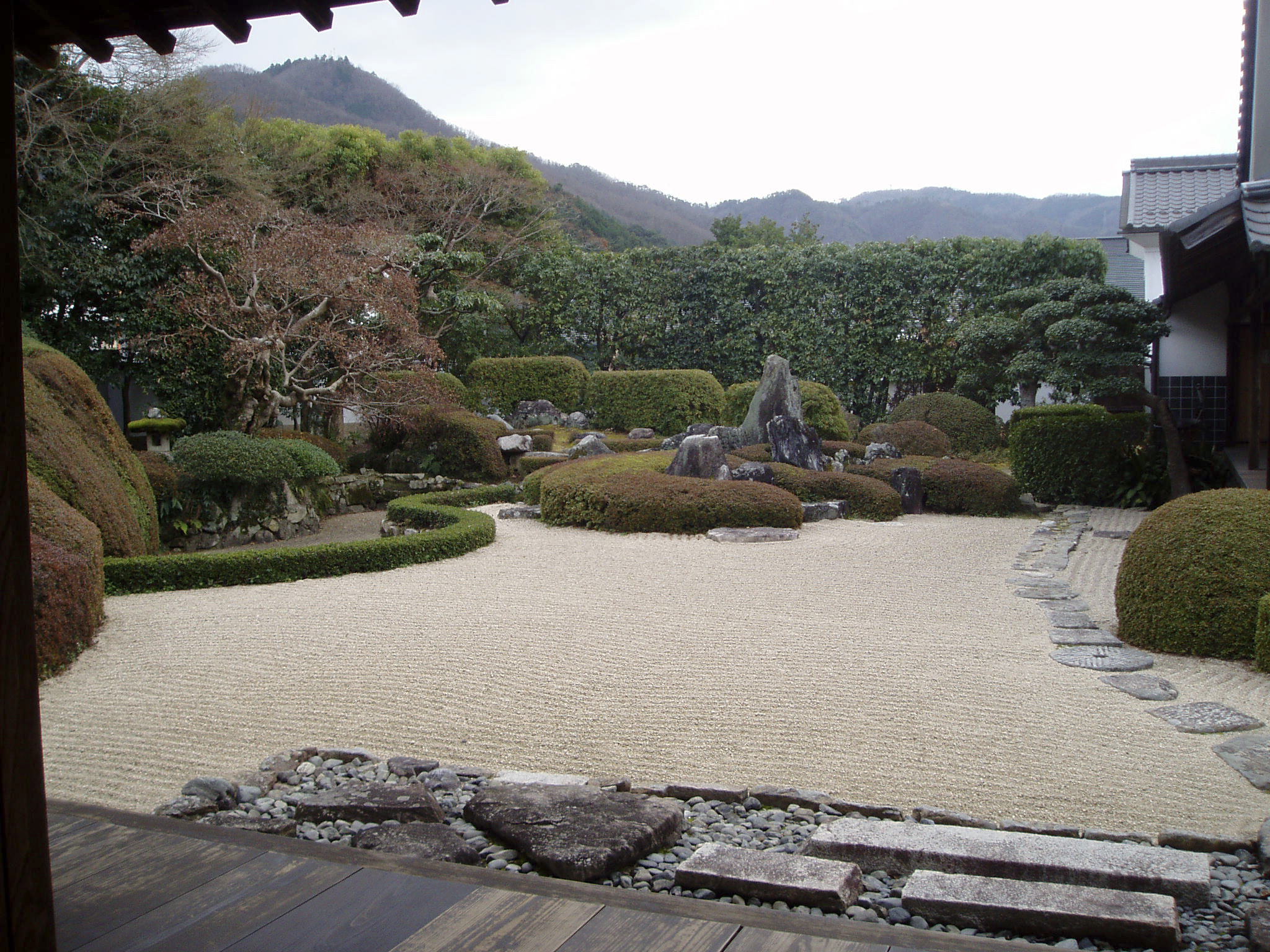 頼久寺(岡山県高梁市)